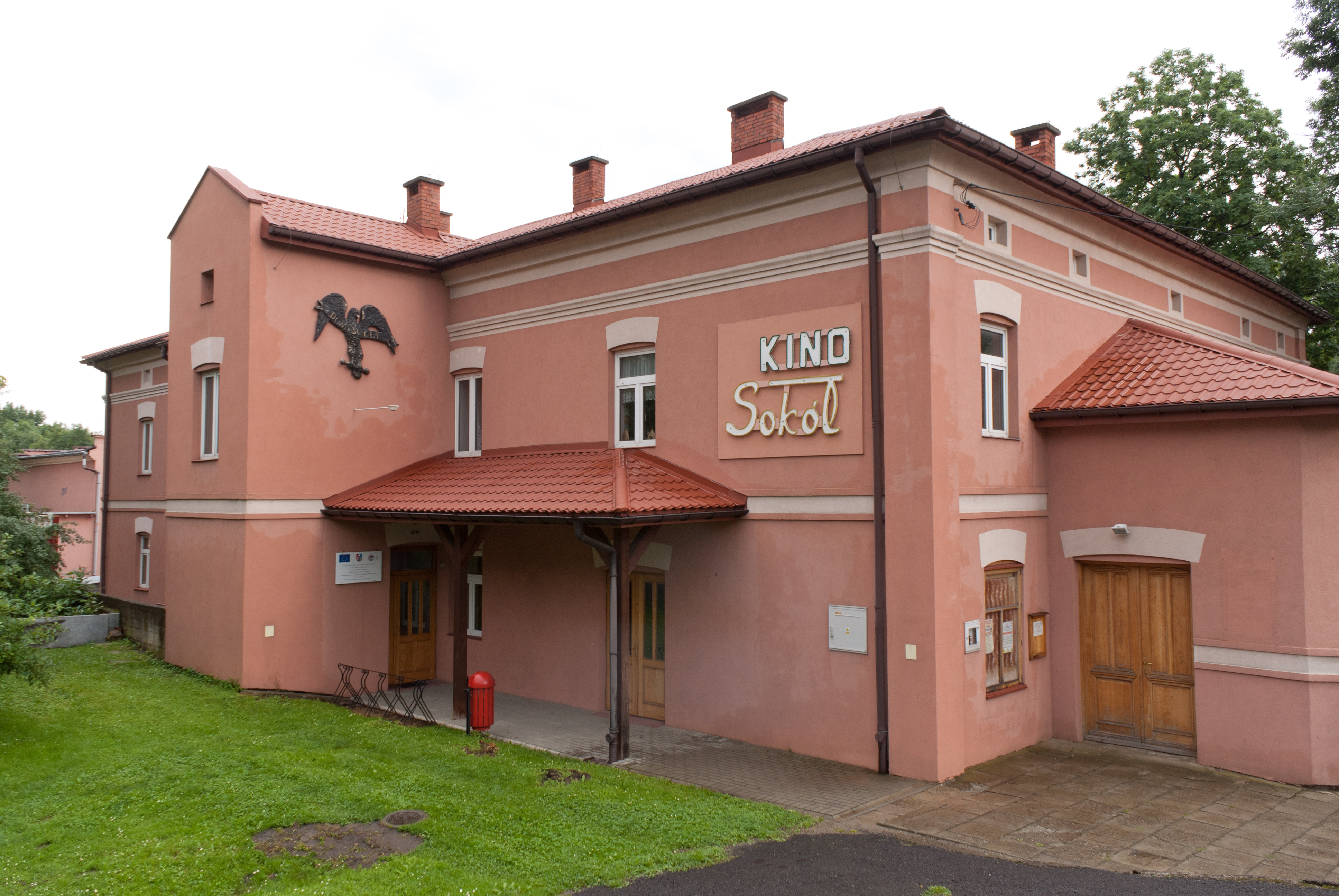 Kino Sokół w Rymanowie.